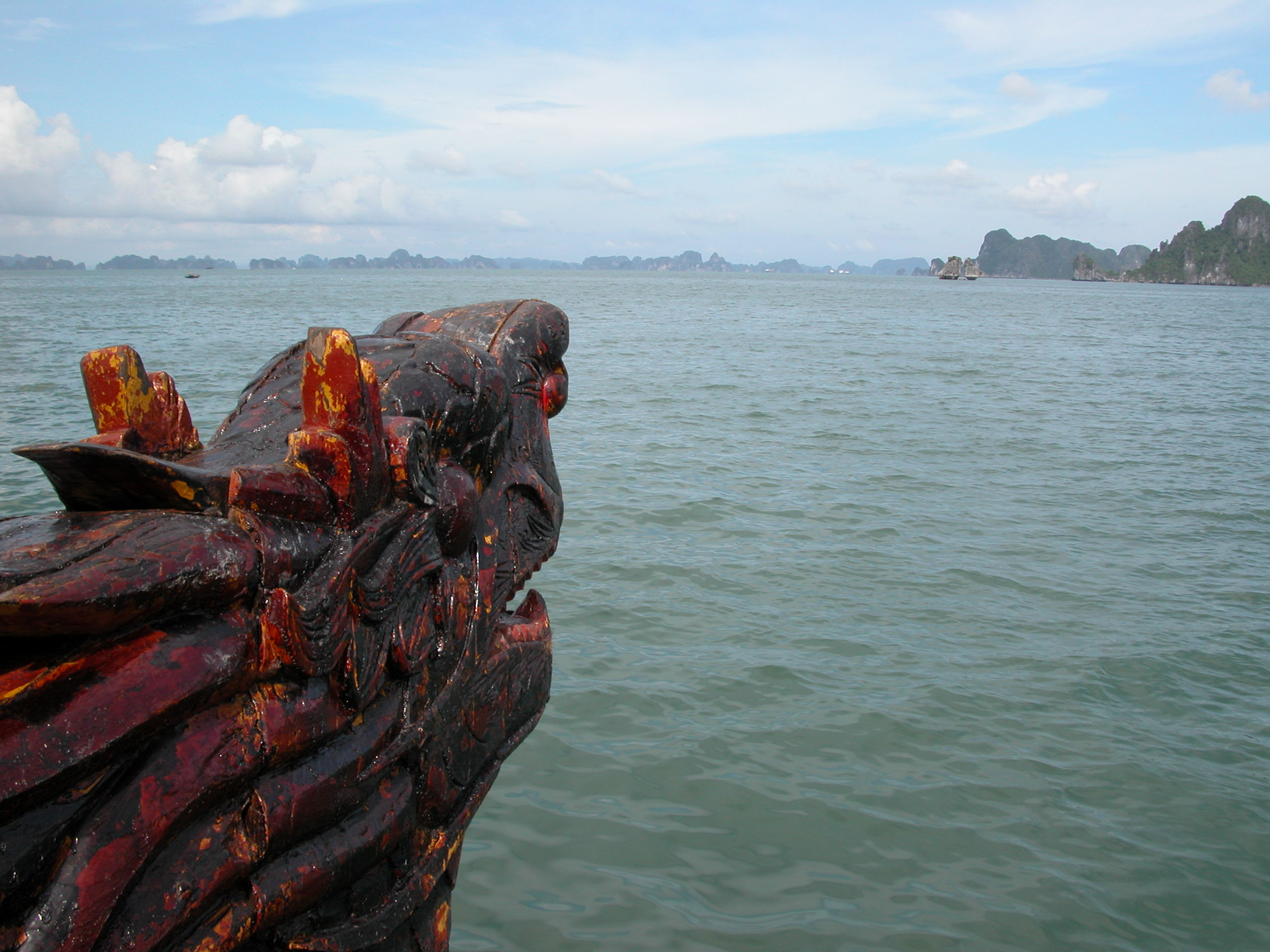 Thuyền rồng tiến ra vịnh.The dragon is descending to the Bay.